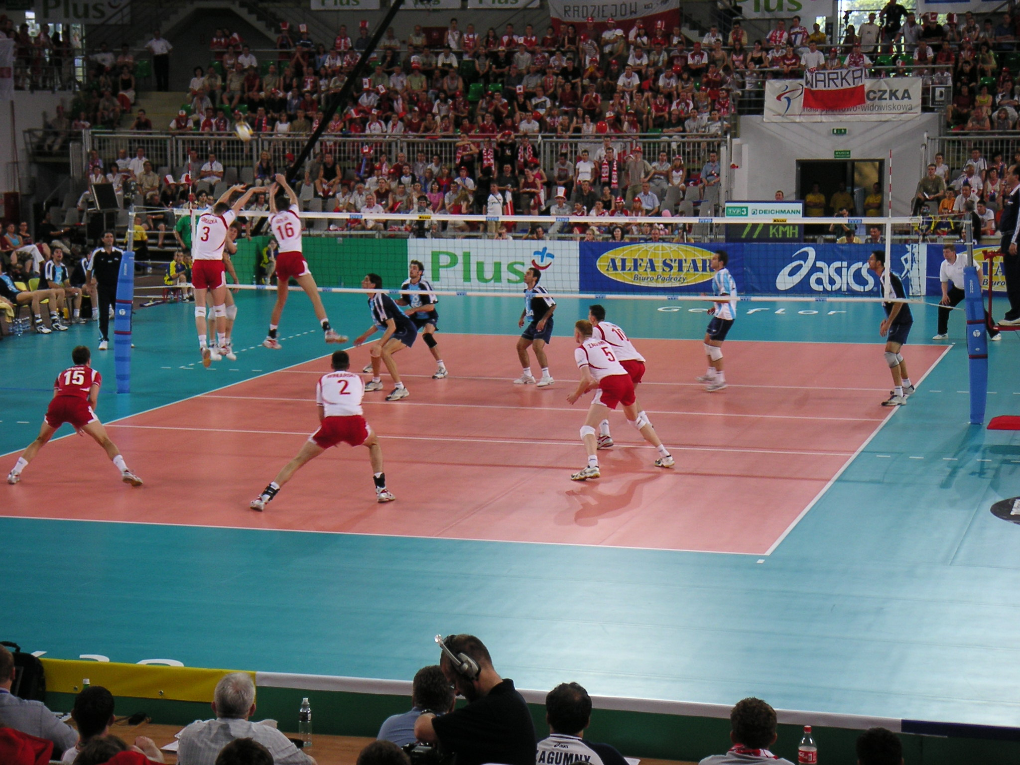 Polska reprezentacja w piłce siatkowej w rozgrywkach ligi światowej 2005. Mecz Polska-Argentyna w Bydgoszczy. Autor zdjęcia: majkelx